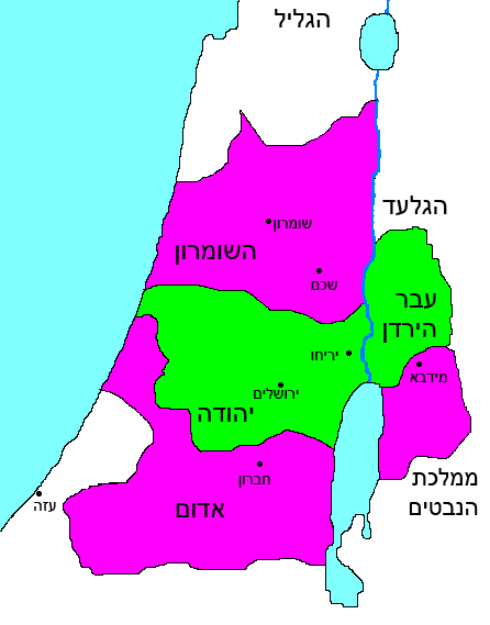 Categorie:Kaart Categorie:Afbeelding oudheid (Original text : Judea onder Johannes Hyrcanus)